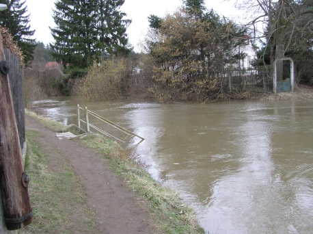 Nespeky, rozlitá Sázava, v míste soutoku s místním potokem...